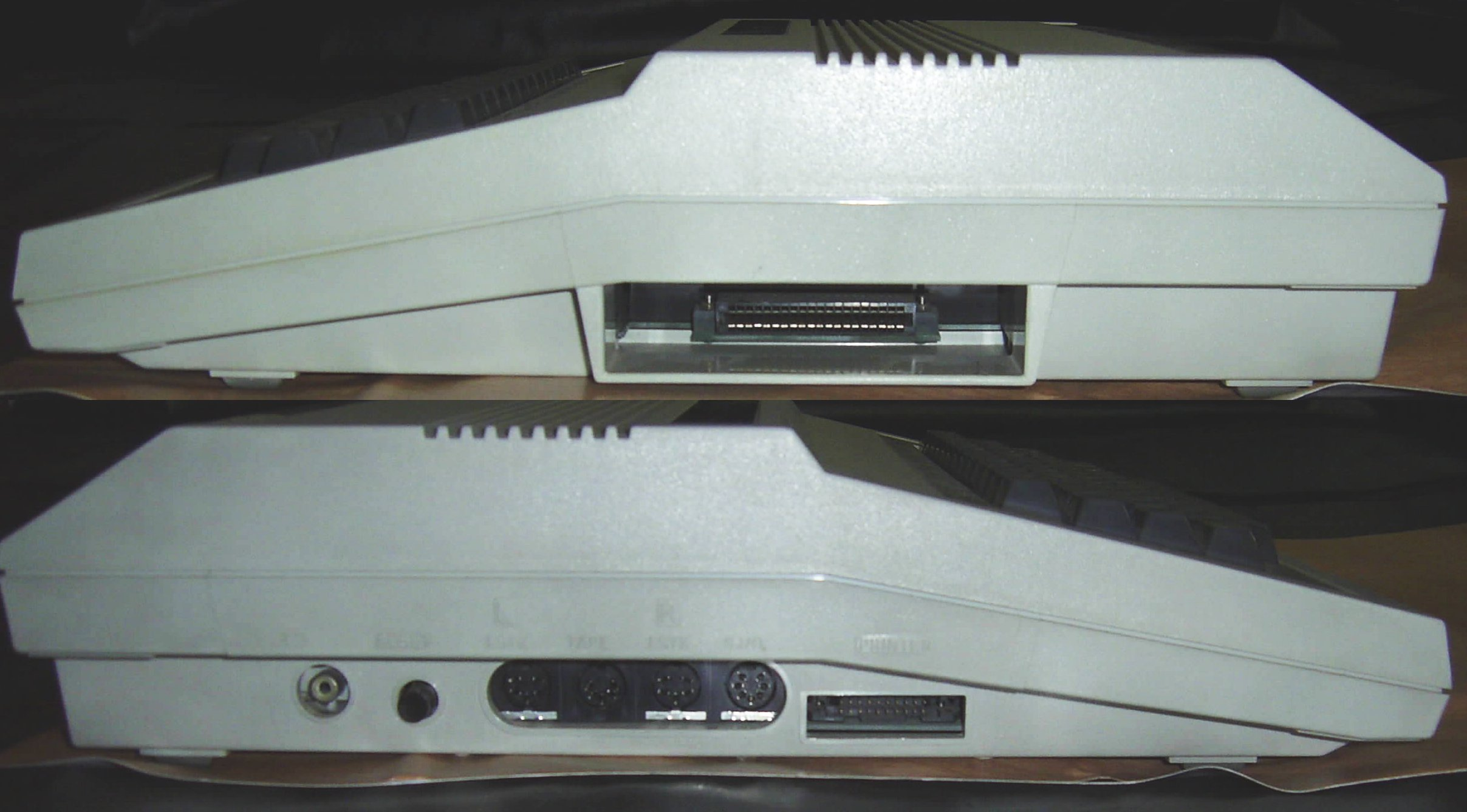 Laterales de un Dragon 64